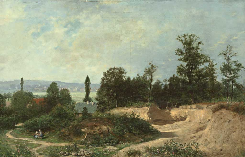 Landschaft am Rande eines Waldes, 1876, Ortsbez. Düsseldorf. Öl auf Leinwand, 76 x 118 cm